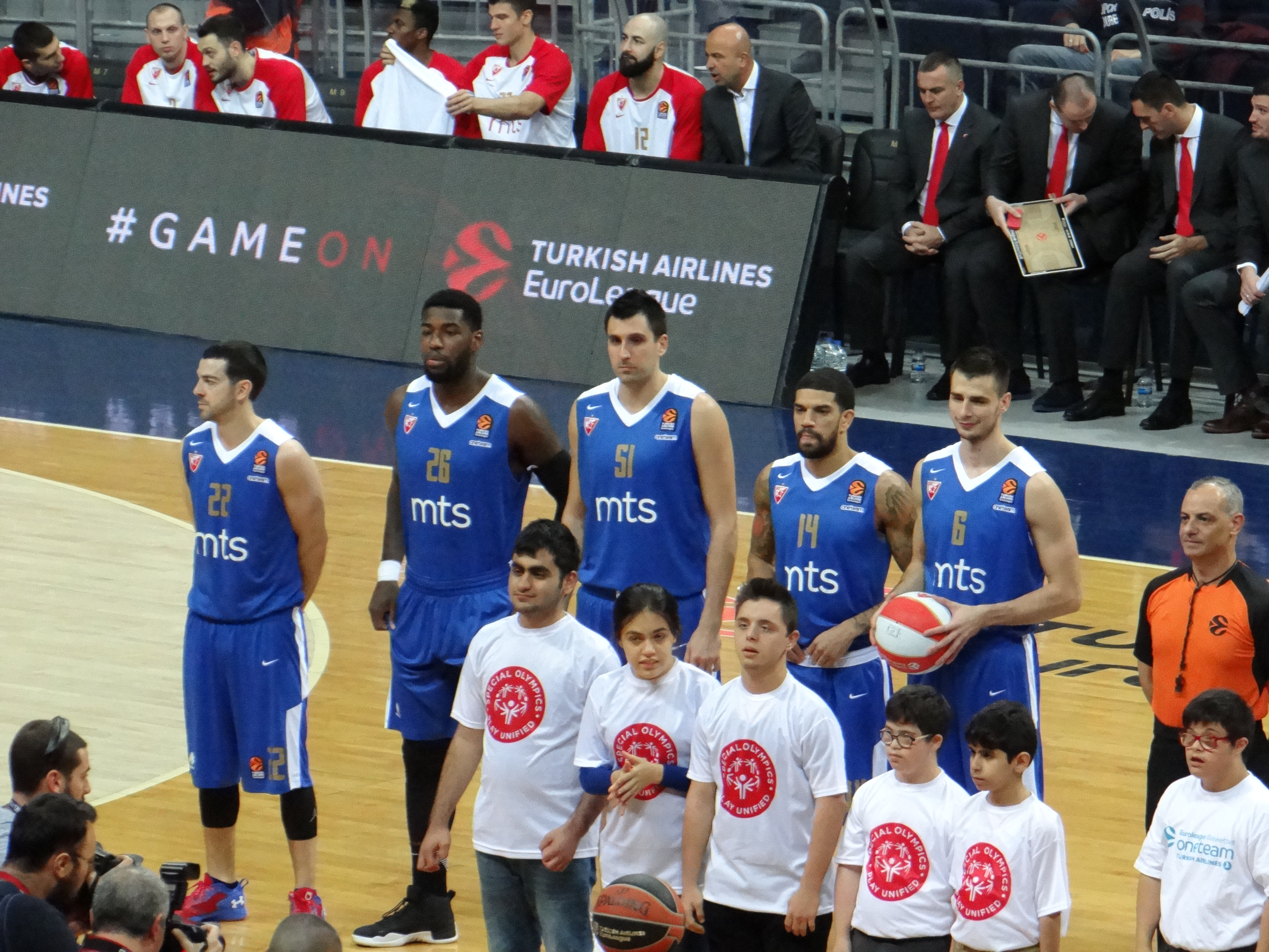 Fenerbahçe Doğuş vs KK Crvena zvezda EuroLeague 20171219